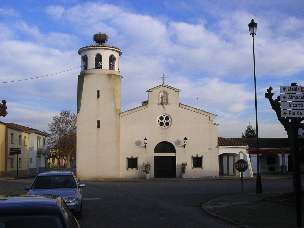 Iglesia del Roser en Gimenells